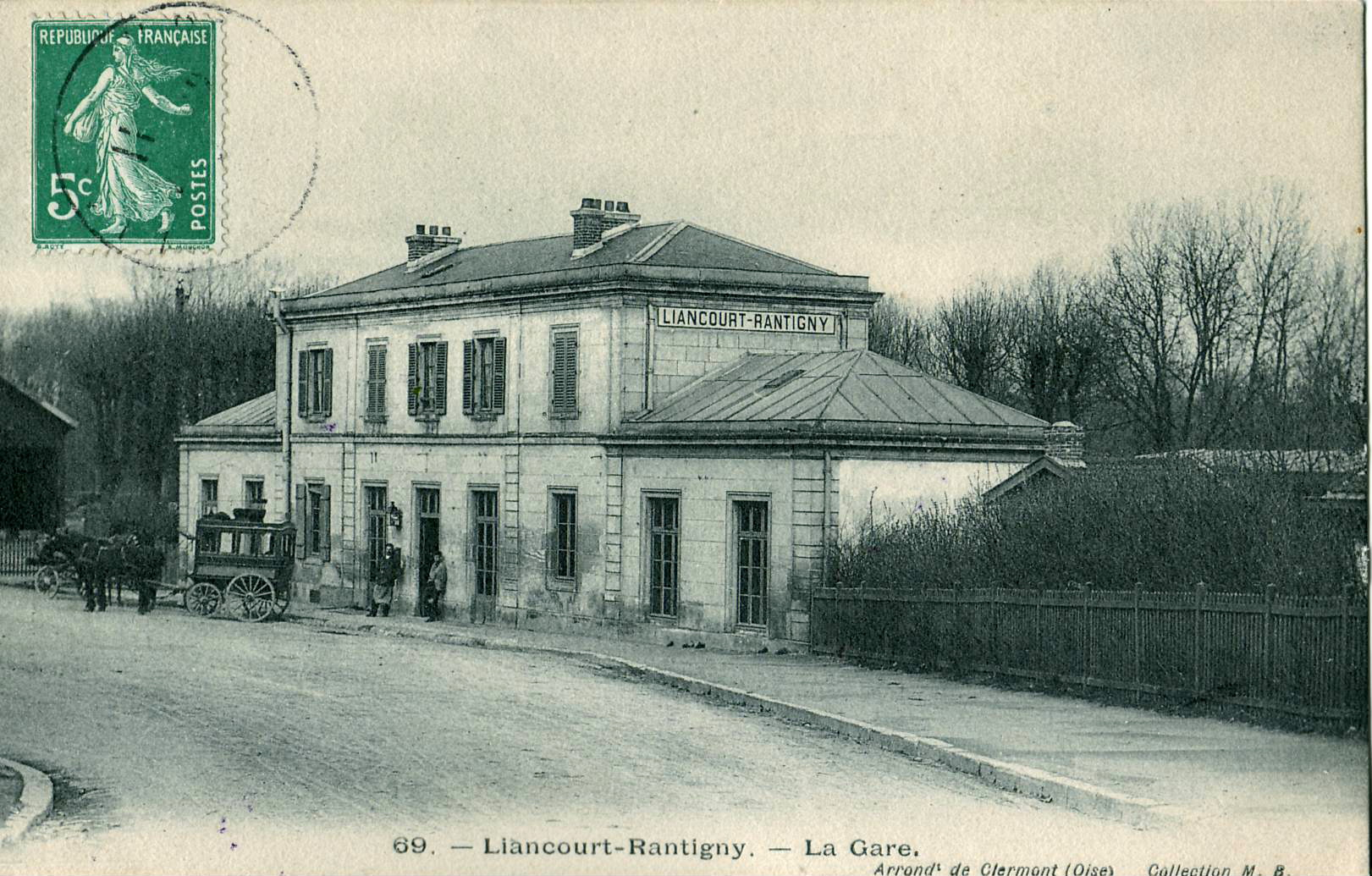 Carte postale ancienne éditée par MB n°69 : LIANCOURT-RANTIGNY - La Gare